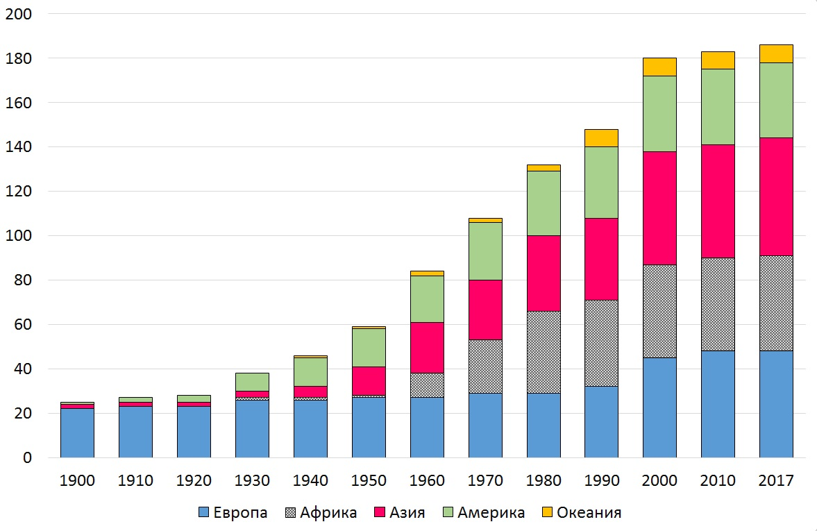 Динамика численности центральных банков в мире, 1900-2017 гг. Источник: Моисеев С. Частные центральные банки // Вопросы экономики, 2017. - №7.